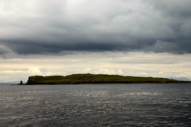 Eilean Trodday